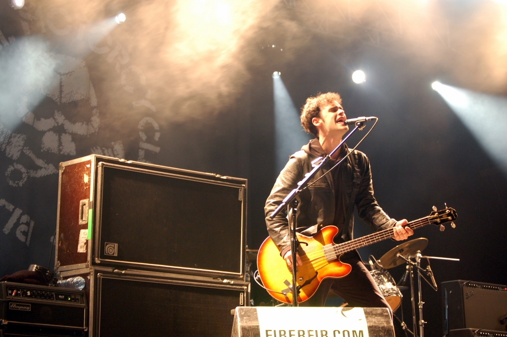 Black Rebel Motorcycle Club at Benicàssim